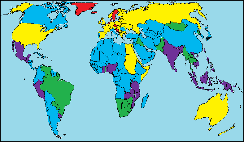 Statura nel mondo